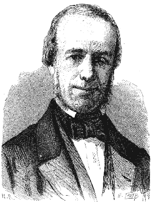 Paul-Gustave Froment (1815-1863)